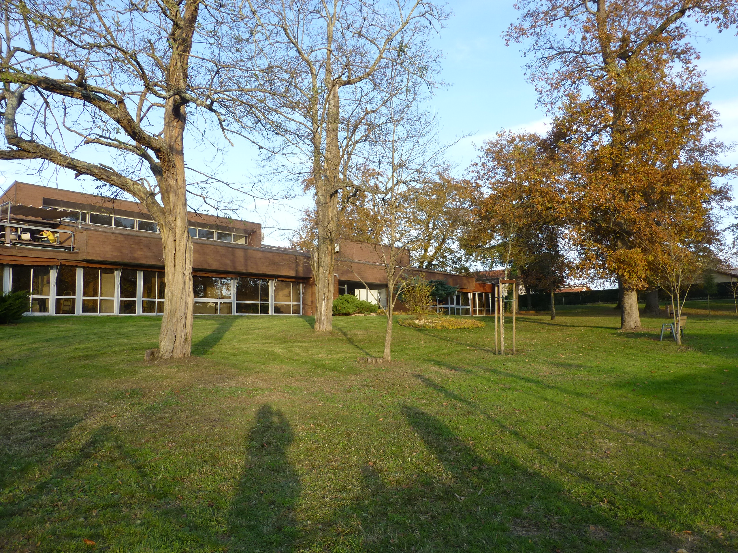 Cestas, Hôtel de ville côté jardin.